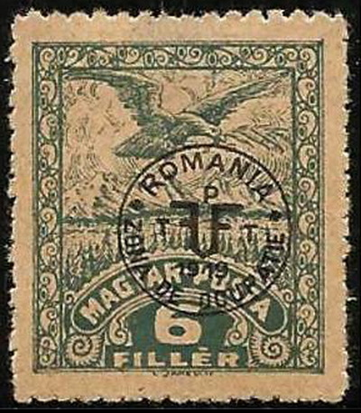 Marcă poştală emisă la Debreţin de administraţia română din Ungaria la sfârşitul anului 1919. Supratipar cu inscripţia "ROMÂNIA. ZONA DE OCUPAŢIE" aplicat peste mărci poştale ungureşti. Aceste mărci au circulat preponderent în Câmpia Tisei.